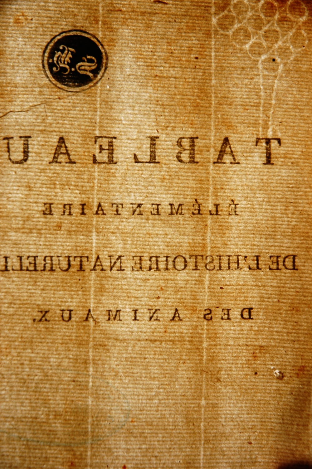 A page from a 1798 book (G. Cuvier, Tableau élémentaire de l'Histoire Naturelle des Animaux, 8°) showing diverse watermarks.